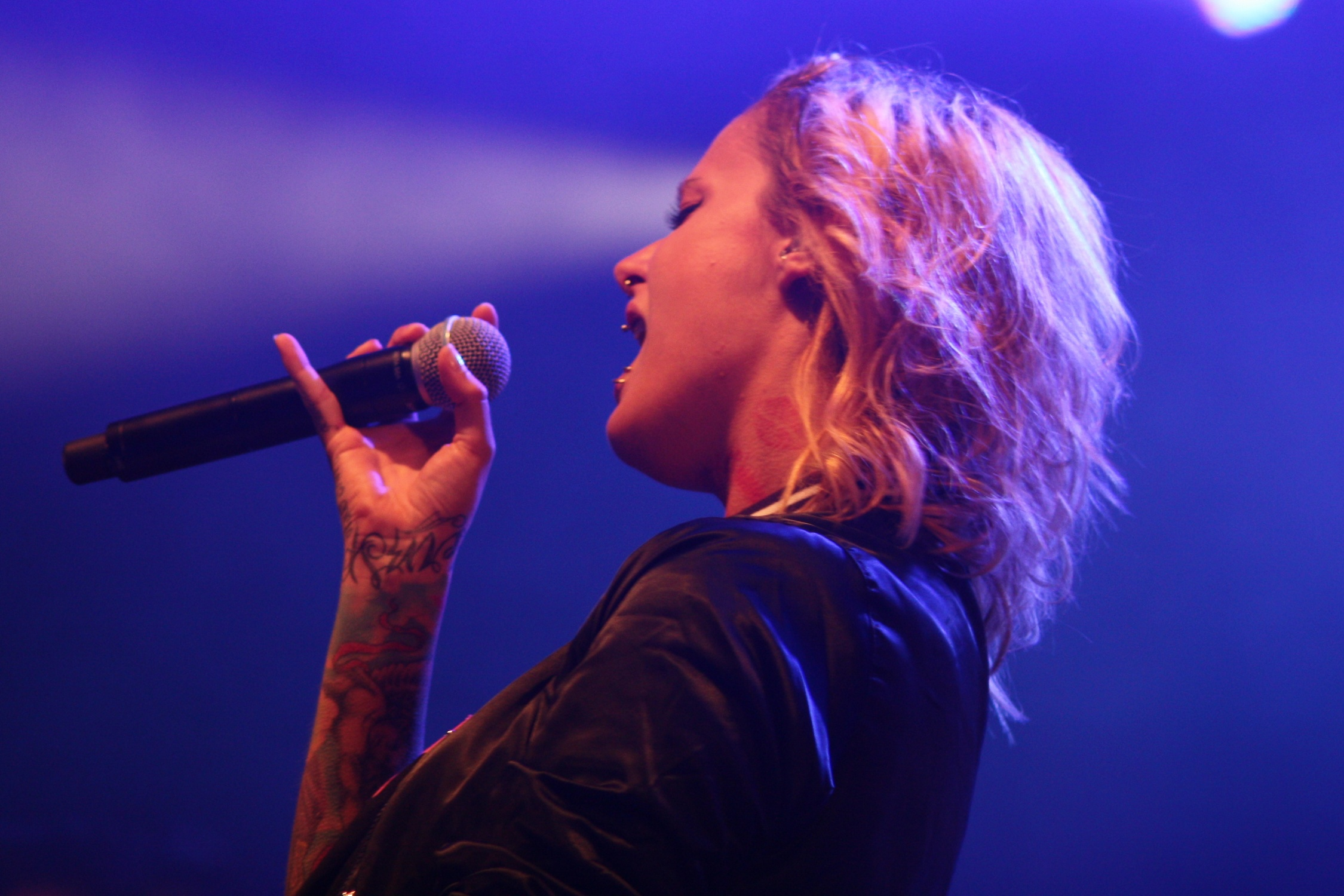 Folklore 013 in Wiesbaden, Auftritt der Gruppe Jennifer Rostock